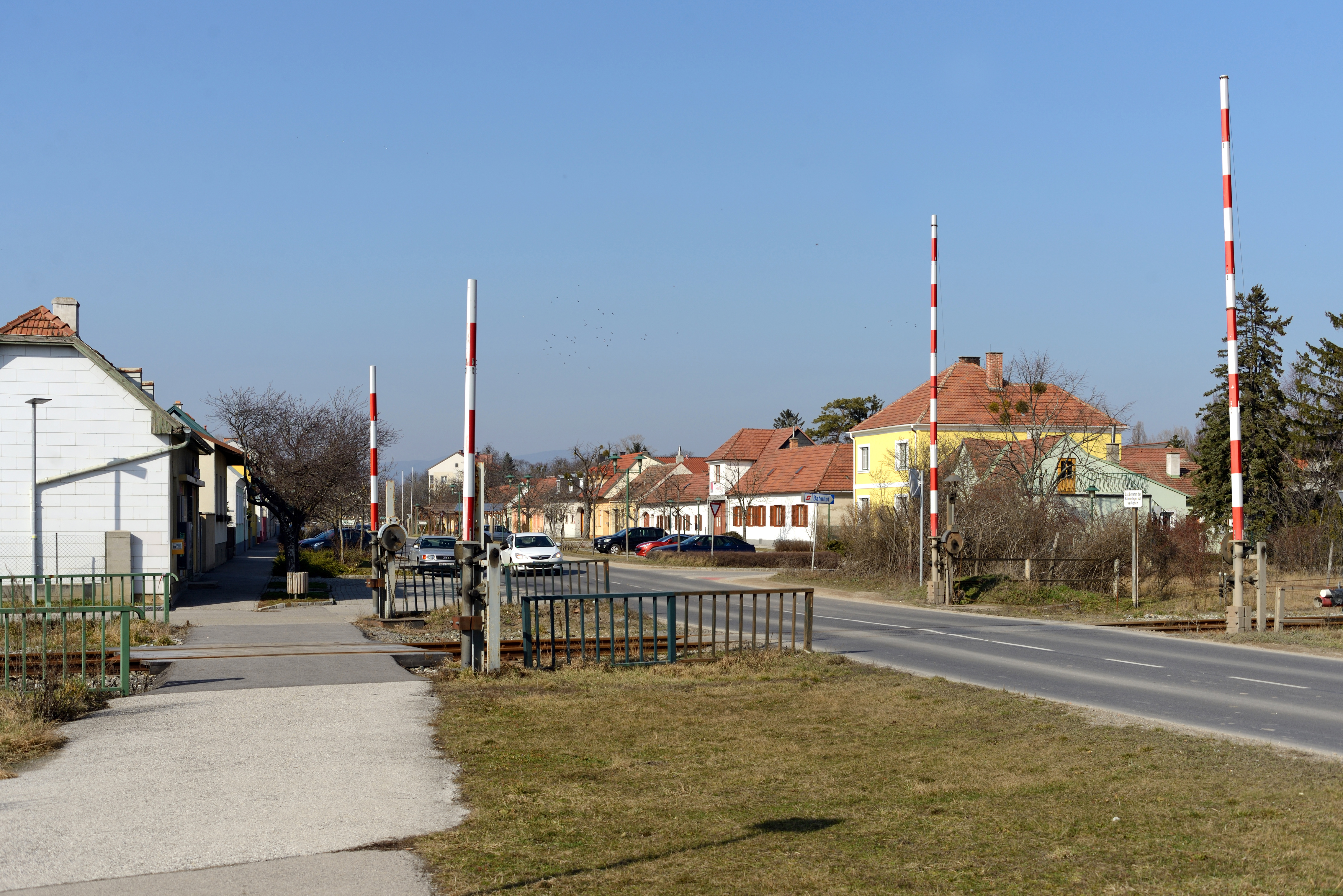 Eisenbahnkreuzung bei Km 33.619 (Bahnhof Tattendorf) an der Landesstraße 157.